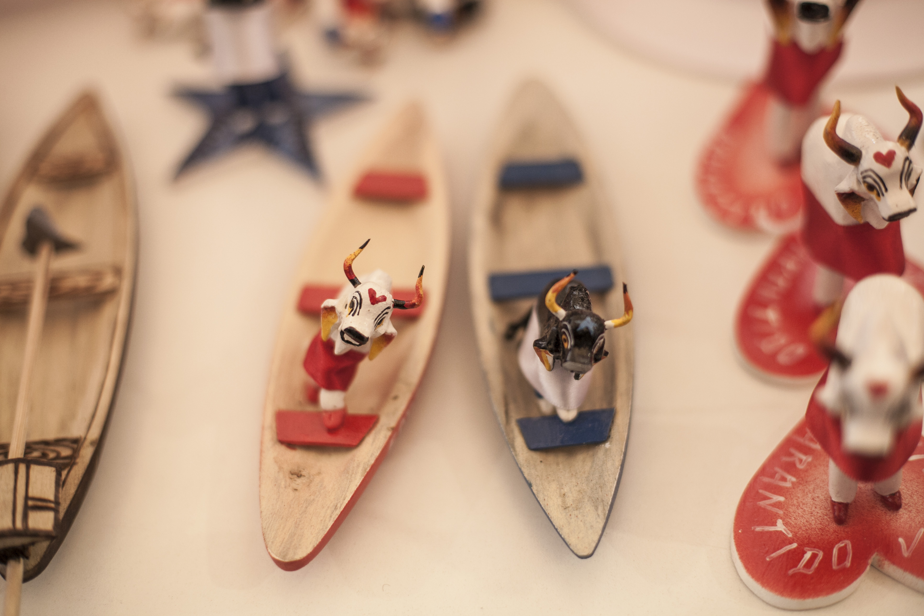 Fotos:Oliver Kornblihtt/SCDC